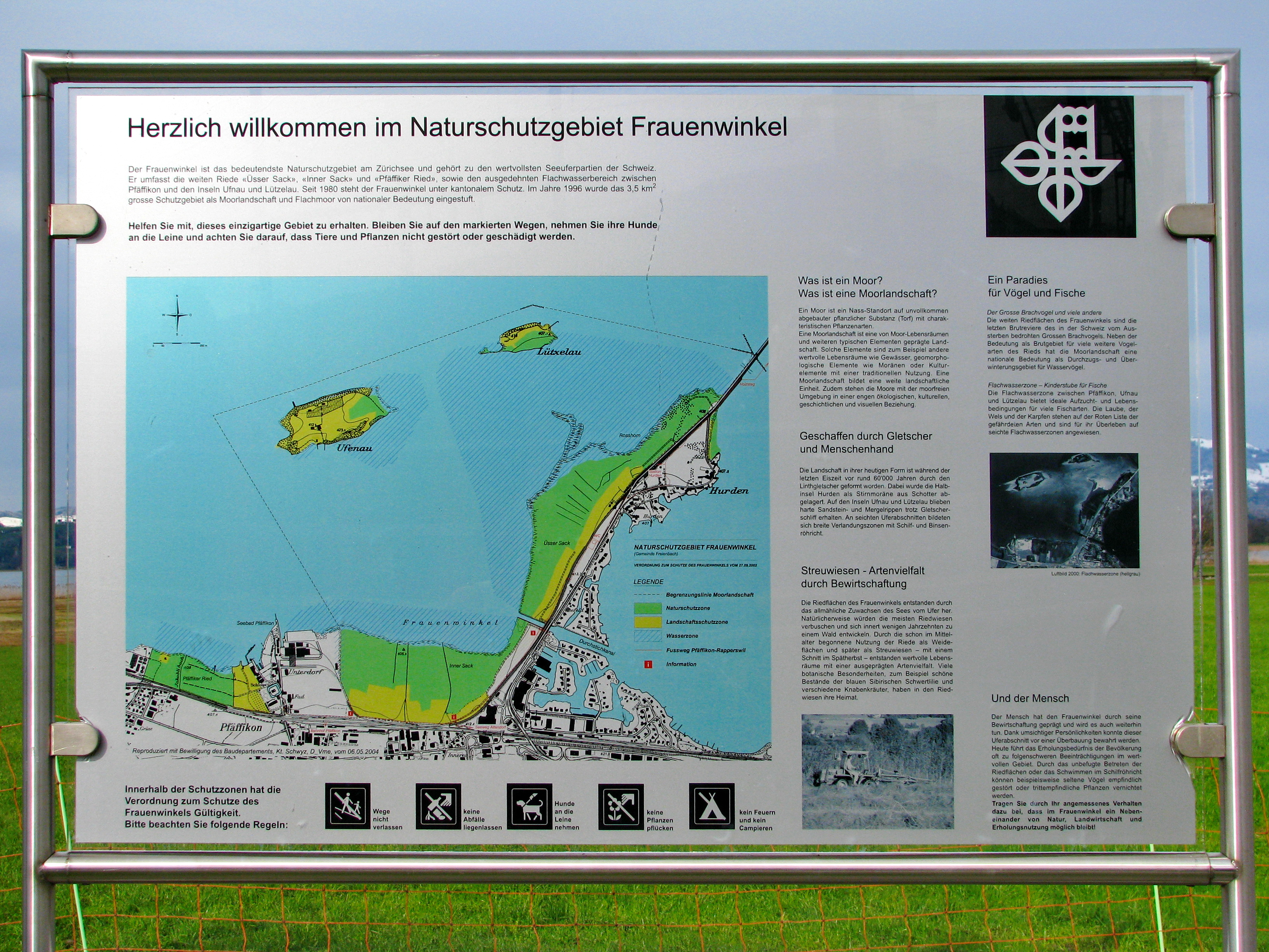 Frauenwinkel protected area (Switzerland) on Zürichsee (Lake Zürich)